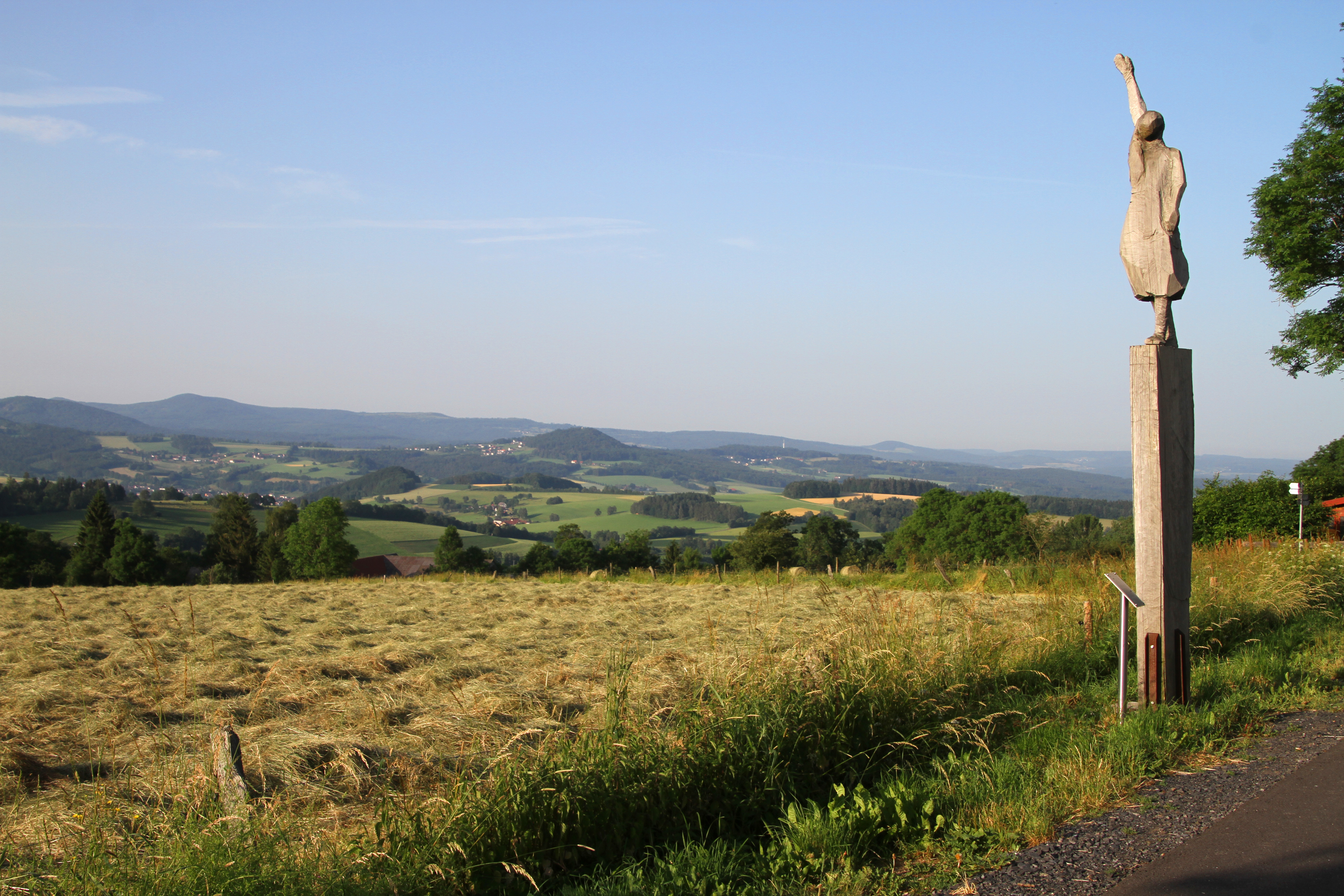 Maulkuppe in der Rhön in Hessen